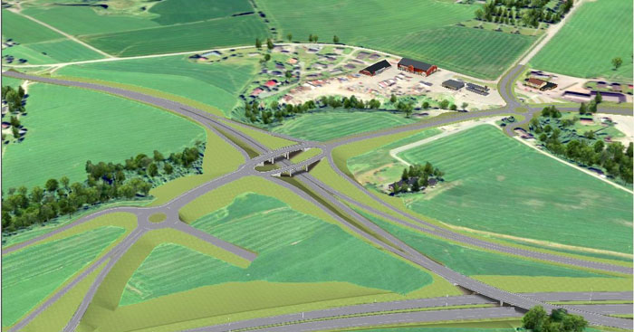 Ett av Statens Vegvesens alternativ for et nytt Klettkryss